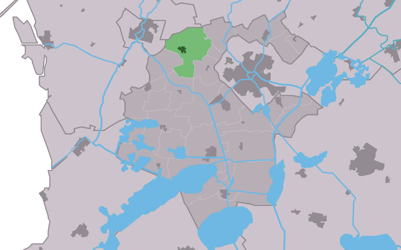 Kaartsje fan himrik fan Nijlân